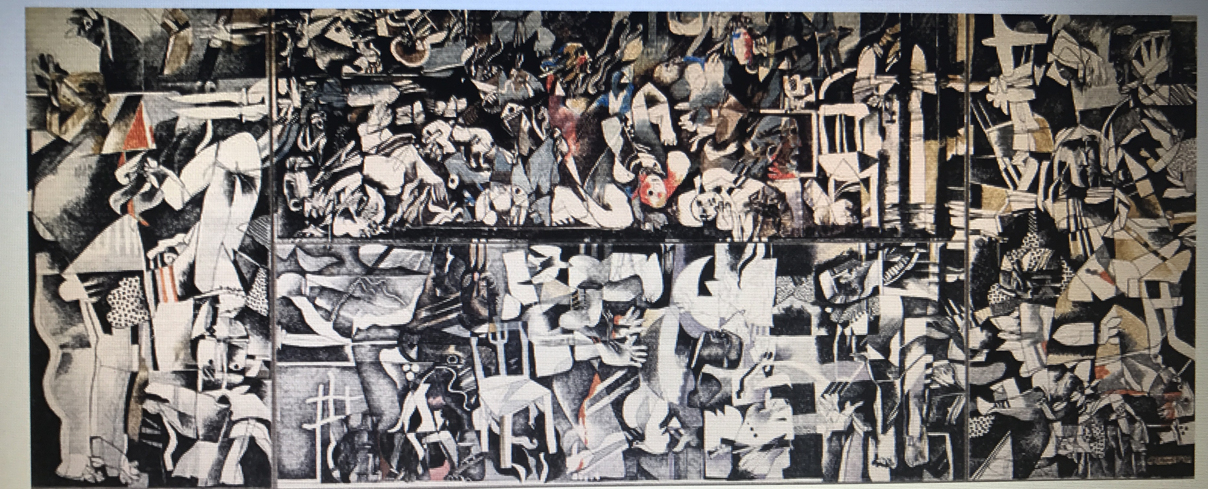 „Sabra and Shatila Massacre” evocă masacrul asupra refugiaților palestinieni din Liban în 1982